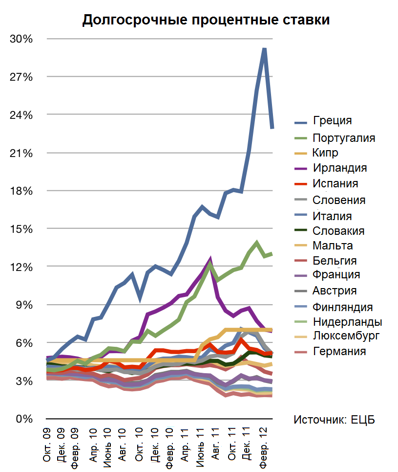 Статистические данные по долгосрочным процентным ставкам гособлигаций (% в год, среднее значение за период, уровень доходности гособлигаций со сроком погашения около 10 лет на вторичном рынке) всех стран ЕС за исключением Эстонии. Как указано в примечании ЕЦБ, поскольку уровень госдолга Эстонии остаётся крайне низким, в настоящее время на рынке облигаций не представлены гособлигации Эстонии, соответствующие критериям исследования. Источник данных